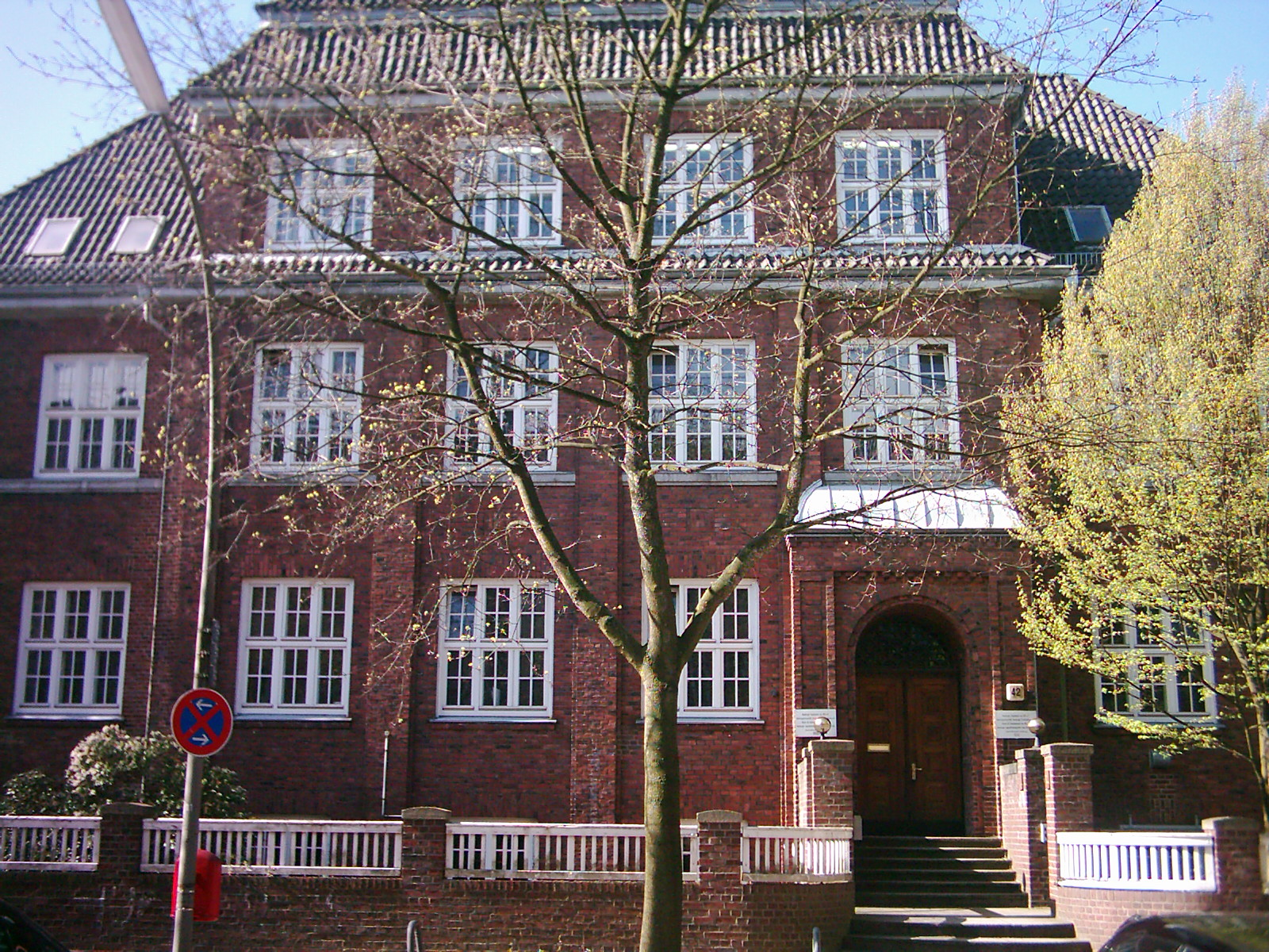 Finkenau 42, Geschäftsstelle folgender Institutionen: Hamburger Schulverein von 1875 e.V. Arbeitsgemeinschaft Hamburger Schullandheime e.V. Verein für Ferienkolonien von 1904 e.V. Hamburger Jugenderholungsheim Puan Klent auf Sylt. Siehe auch Image:Hamburger Schulverein Finkenau 004.jpg.